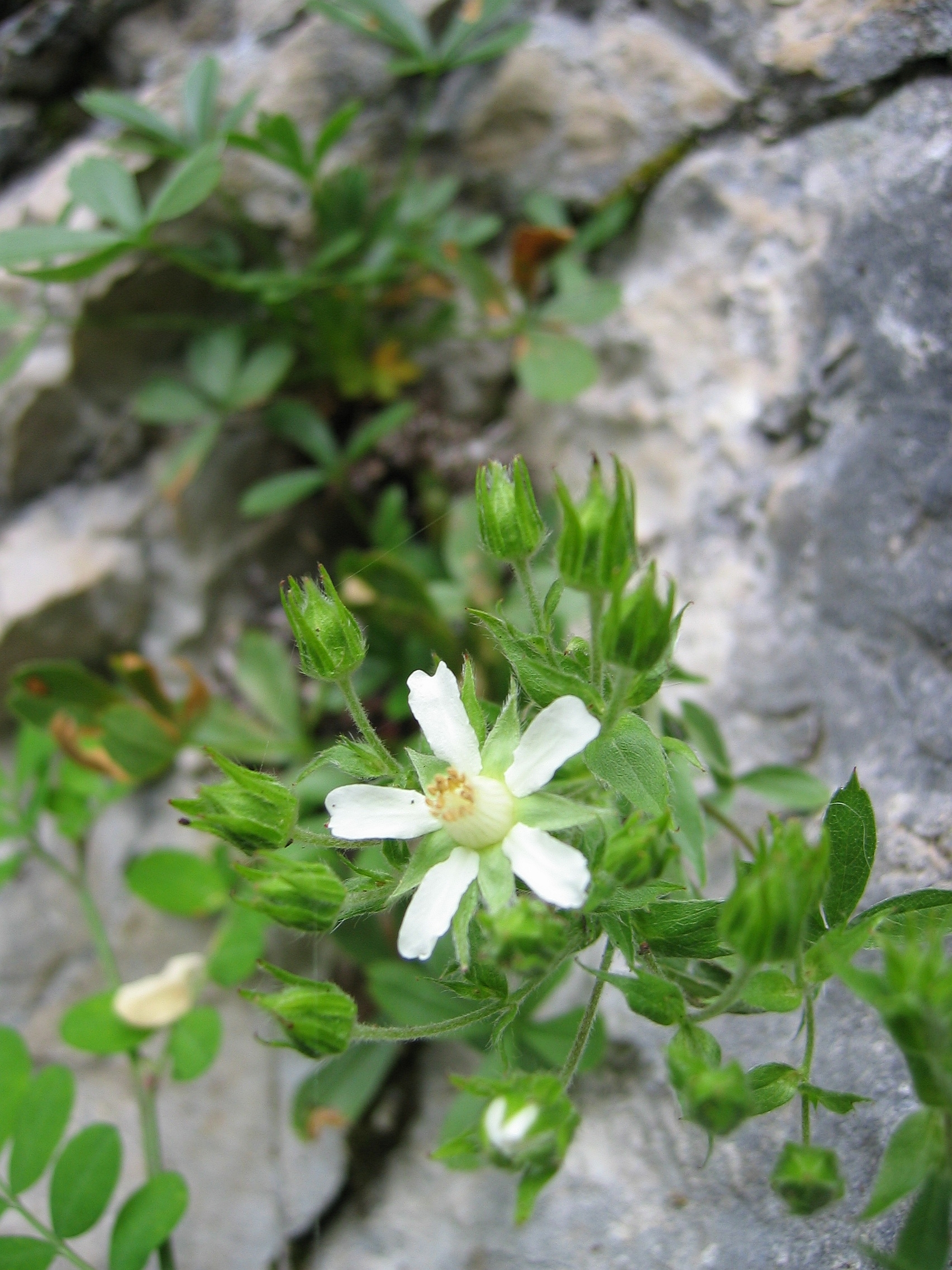 Potentilla caulescens, Traunsee (Miesweg), Upper Austria, Austria